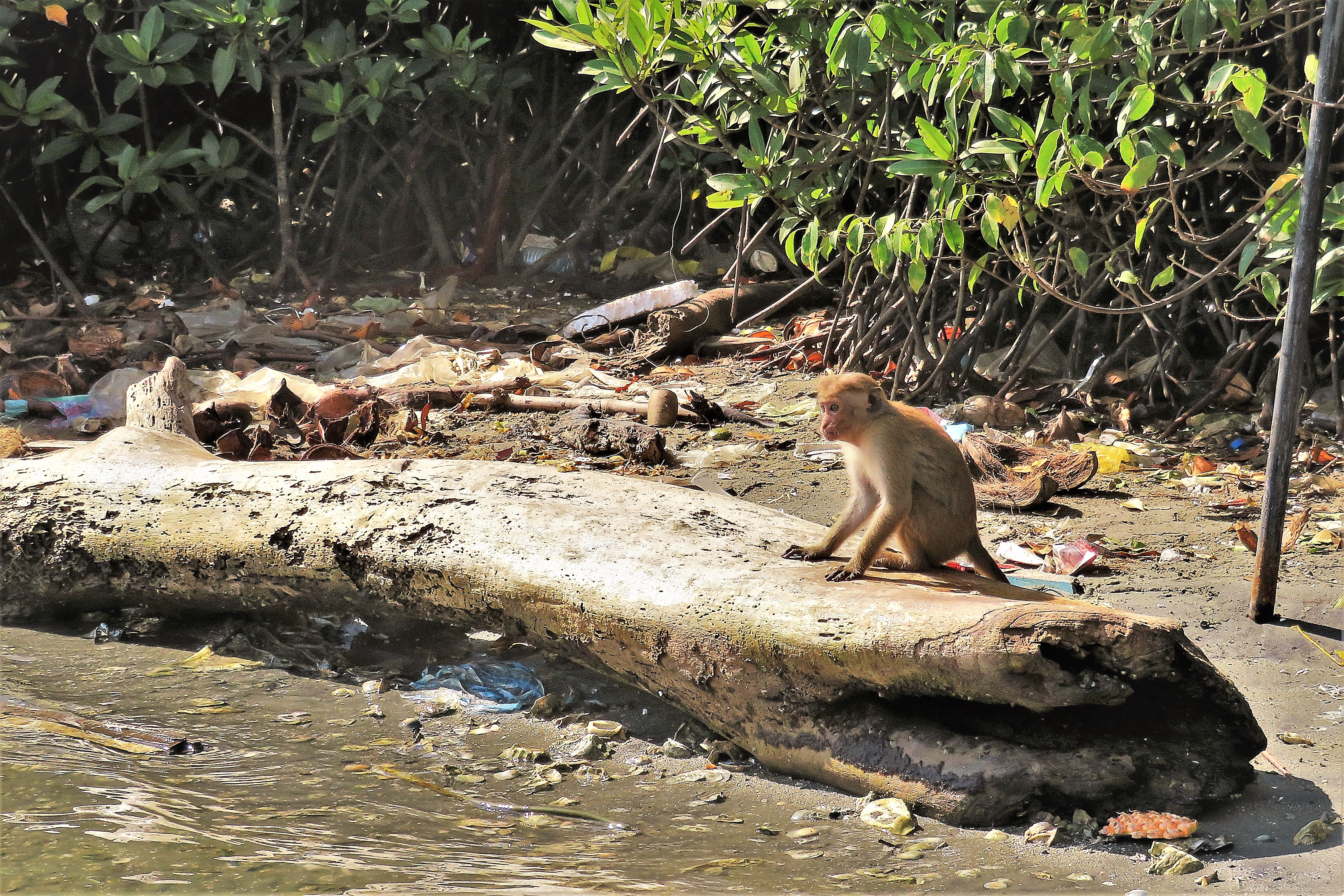 Gefährdeter Lebensraum heimischer Tierarten.